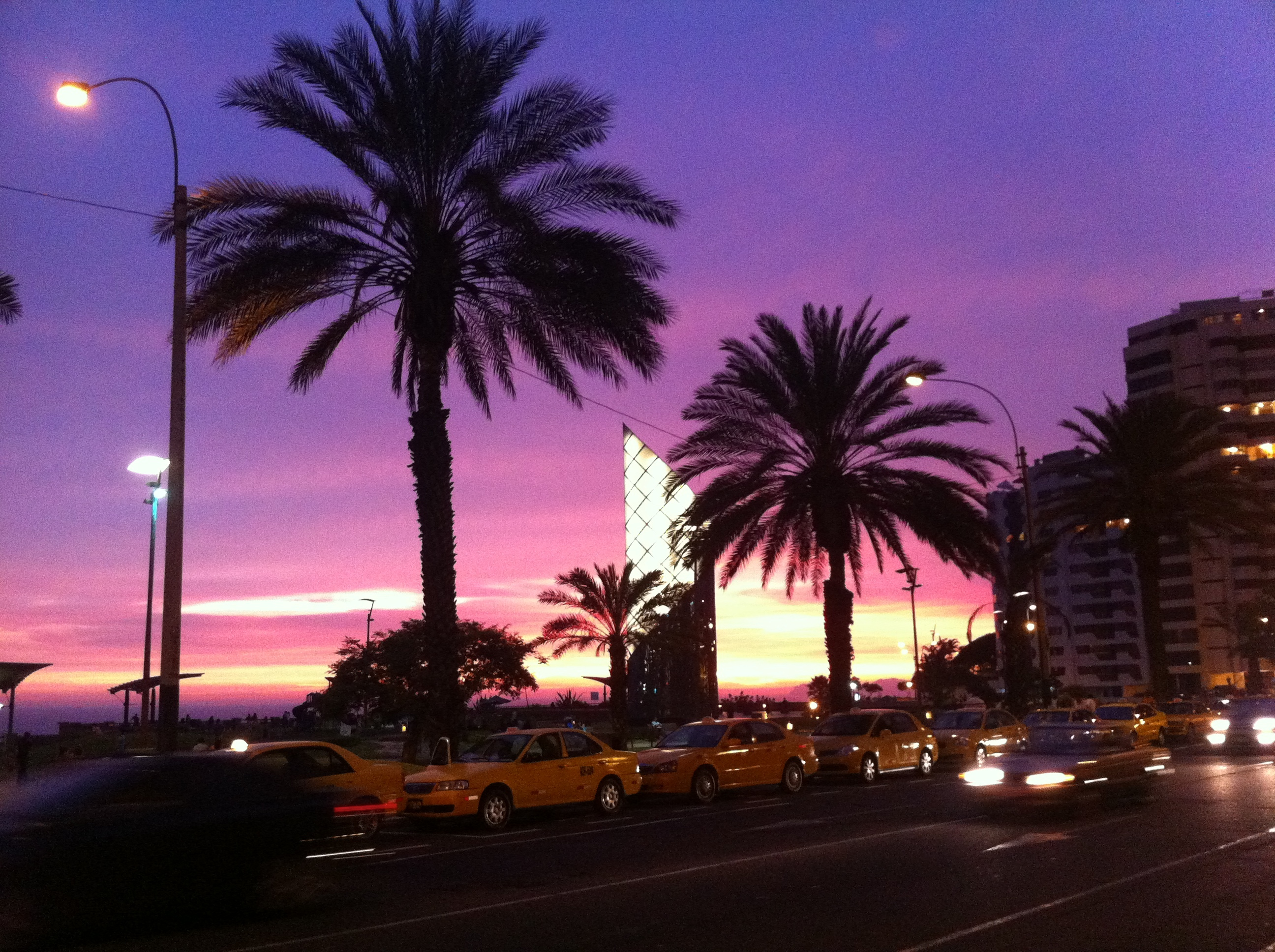 Peru - Lima 127 - sunset over Larcomar